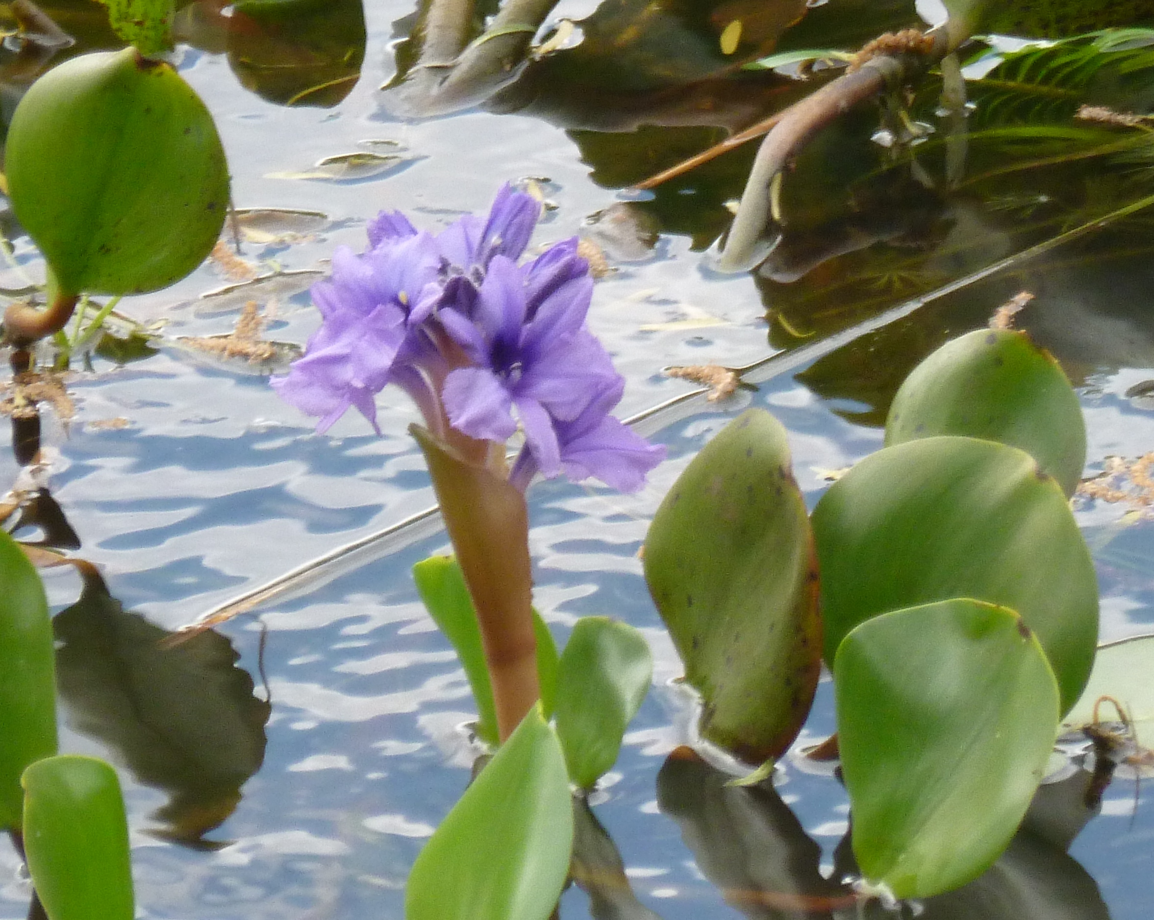 JACINTO DE AGUA EICHHORNIA CRASSIPES de los ESTEROS DEL IBERA ( el segundo mayor humedal del mundo,) provincia de Corrientes, Argentina.